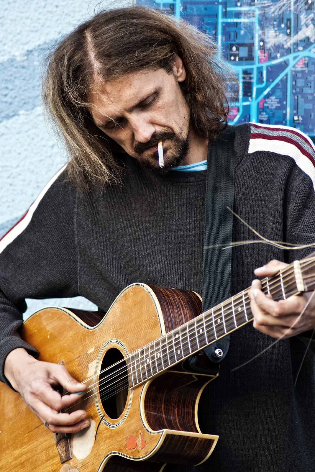 Gienek Loska podczas występu ulicznego w Warszawie, maj 2011.